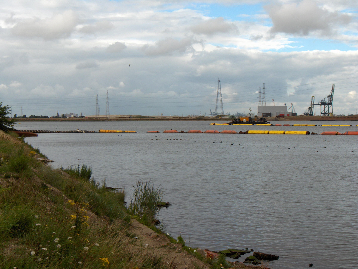 Bild: Doeldok, Hafen von Antwerpen (Waaslandhaven, Gemeinde Beveren), Blick vom Hogendijk (Mitte des Doeldoks), nordwärts